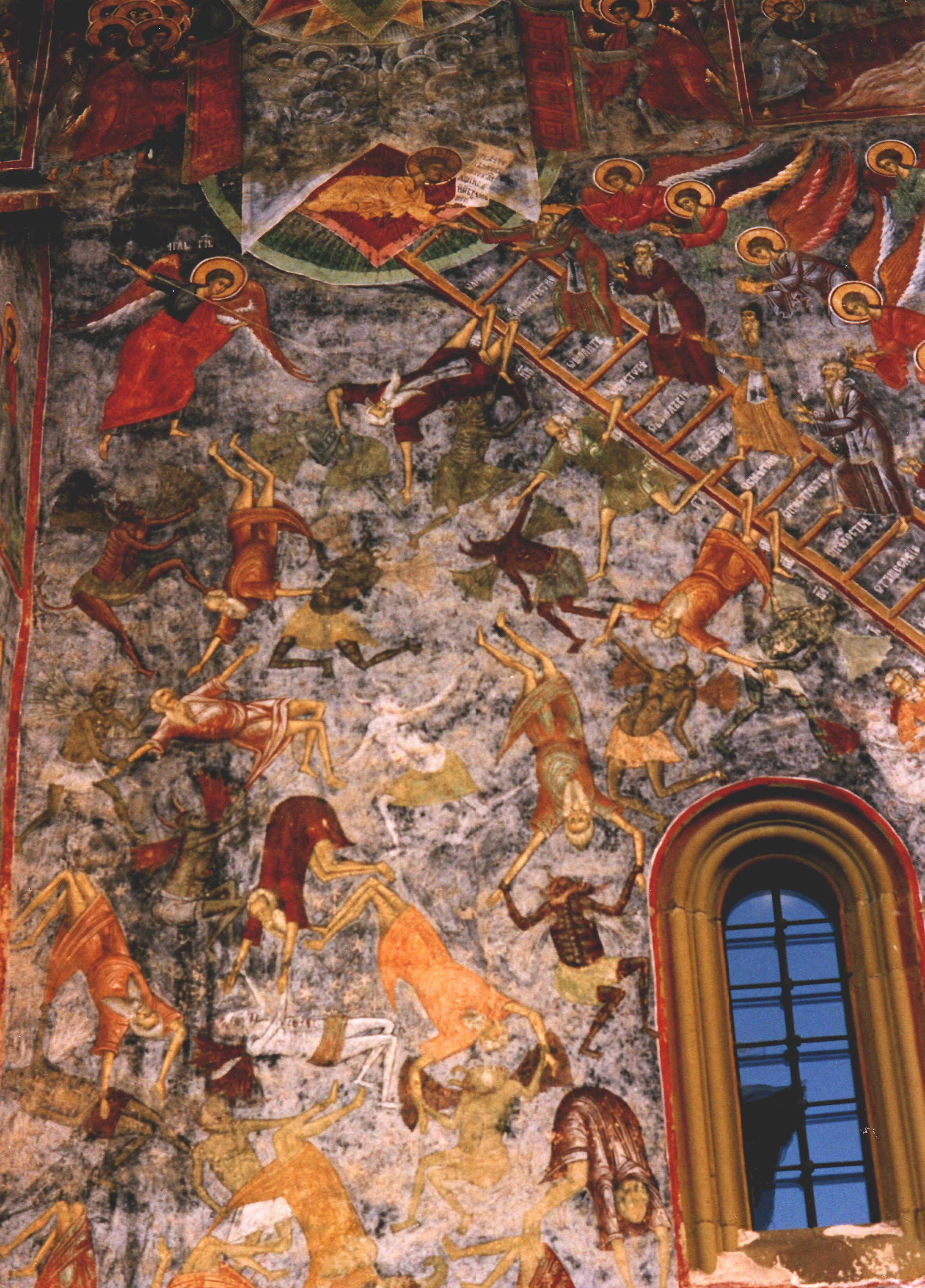 Sucevita. készítette Kiss Tamás Kit36 Licensing Felvétel: Kiss Tamás, 2003.10.02. Kisfilmesgép, CHINON CS4, FUJI Superia 200. Szerkesztés: Kiss T. 2006.12.20. 10/15-ös papirképről, CANON Lide 500 N 600 dpi. (képkivágás, szinkorr.)